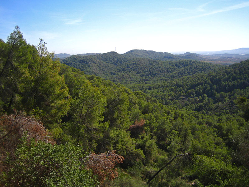 Les Rodanes, bosc mediterrani a Vilamarxant, Camp de Túria, País Valencià.